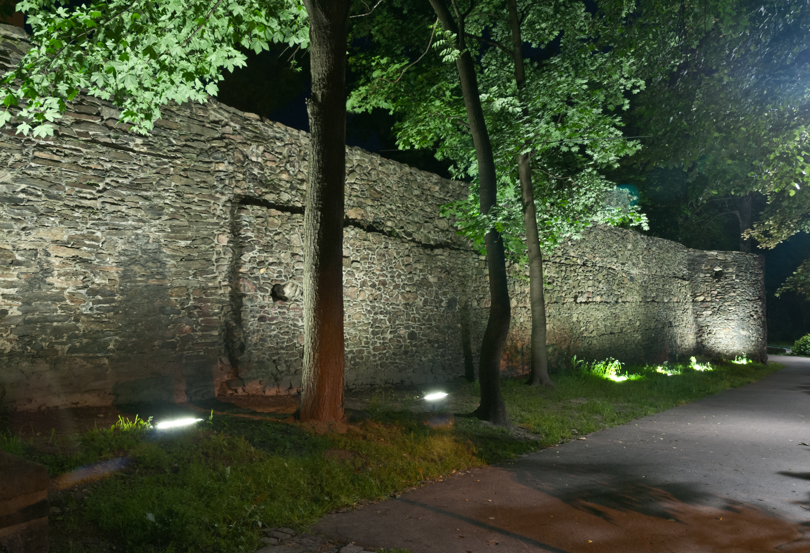 Paczków, zespół obwarowań miejskich, XIV, XVI, XIX